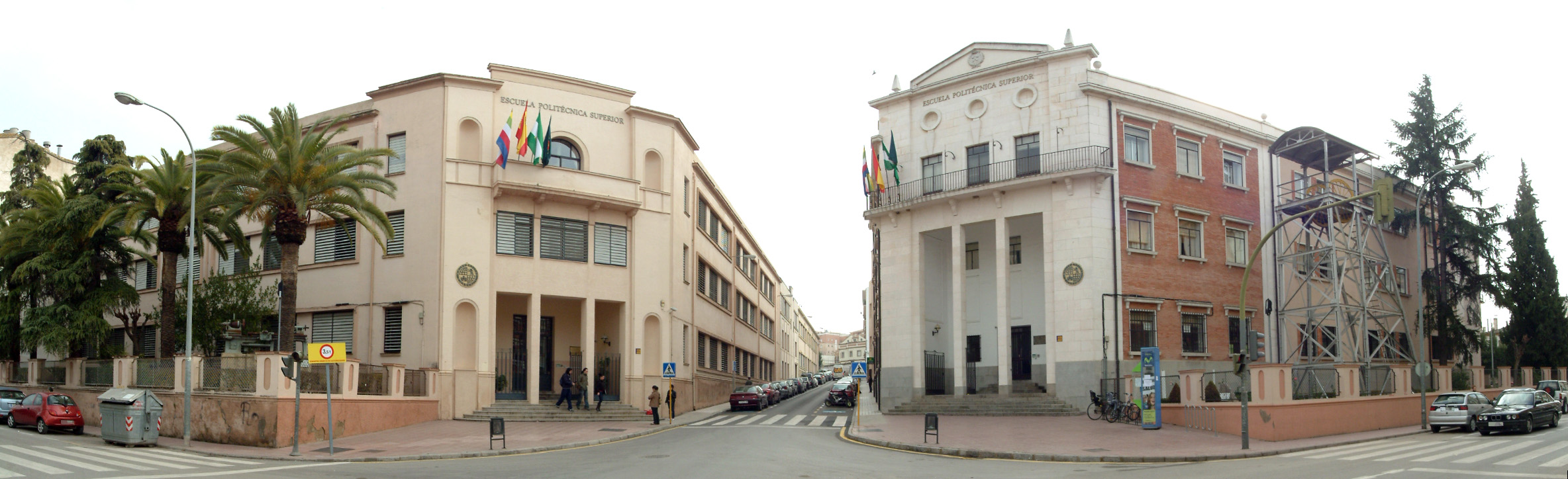 Vista Frontal de la Escuela Politécnica Superior de Linares (Jaén), España.